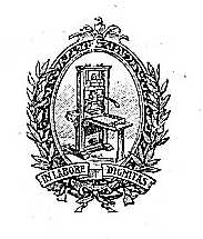 Logo Adriano Salani editore - frontespizio